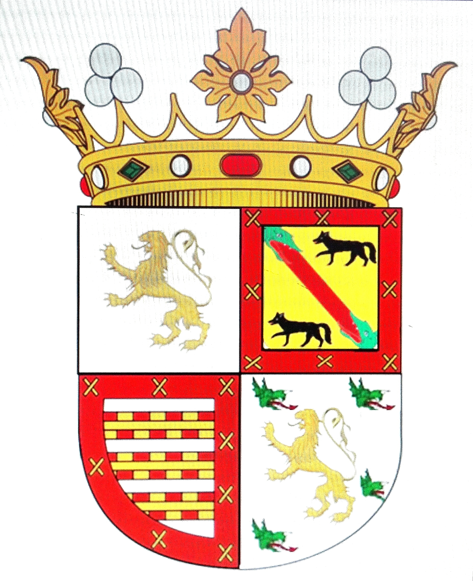 Escudo de Armas de Eva Maria de León-Arias de Saavedra Garrido Bejarano. Marquesa del Valle de la Reina.